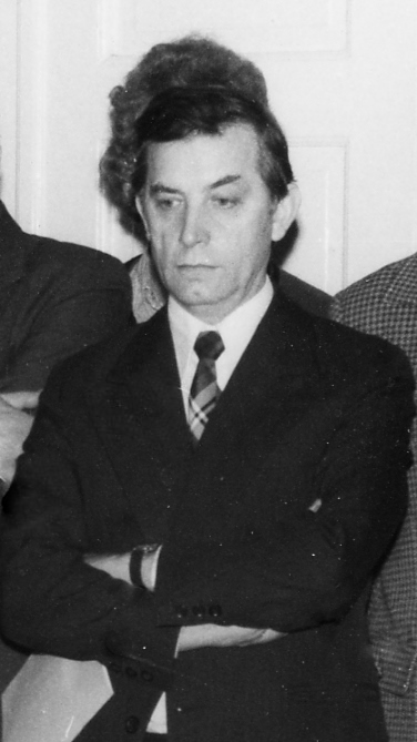 Marian Orzechowski na jubileuszu 60-lecia (i 40-lecia pracy naukowej) prof. Henryka Zielińskiego na Uniwersytecie Wrocławskim